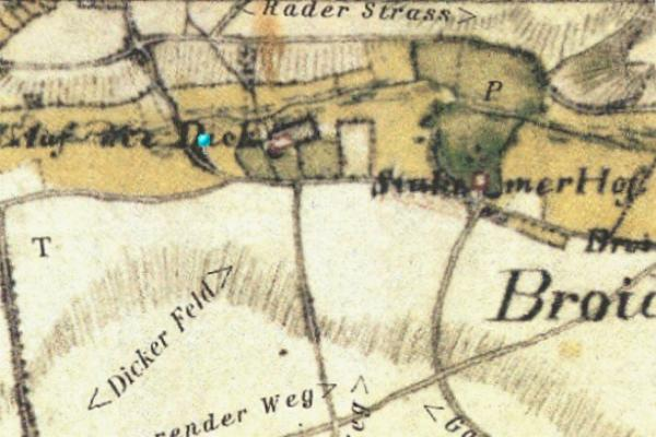 Kartenaufnahme der Rheinlande 1804/05